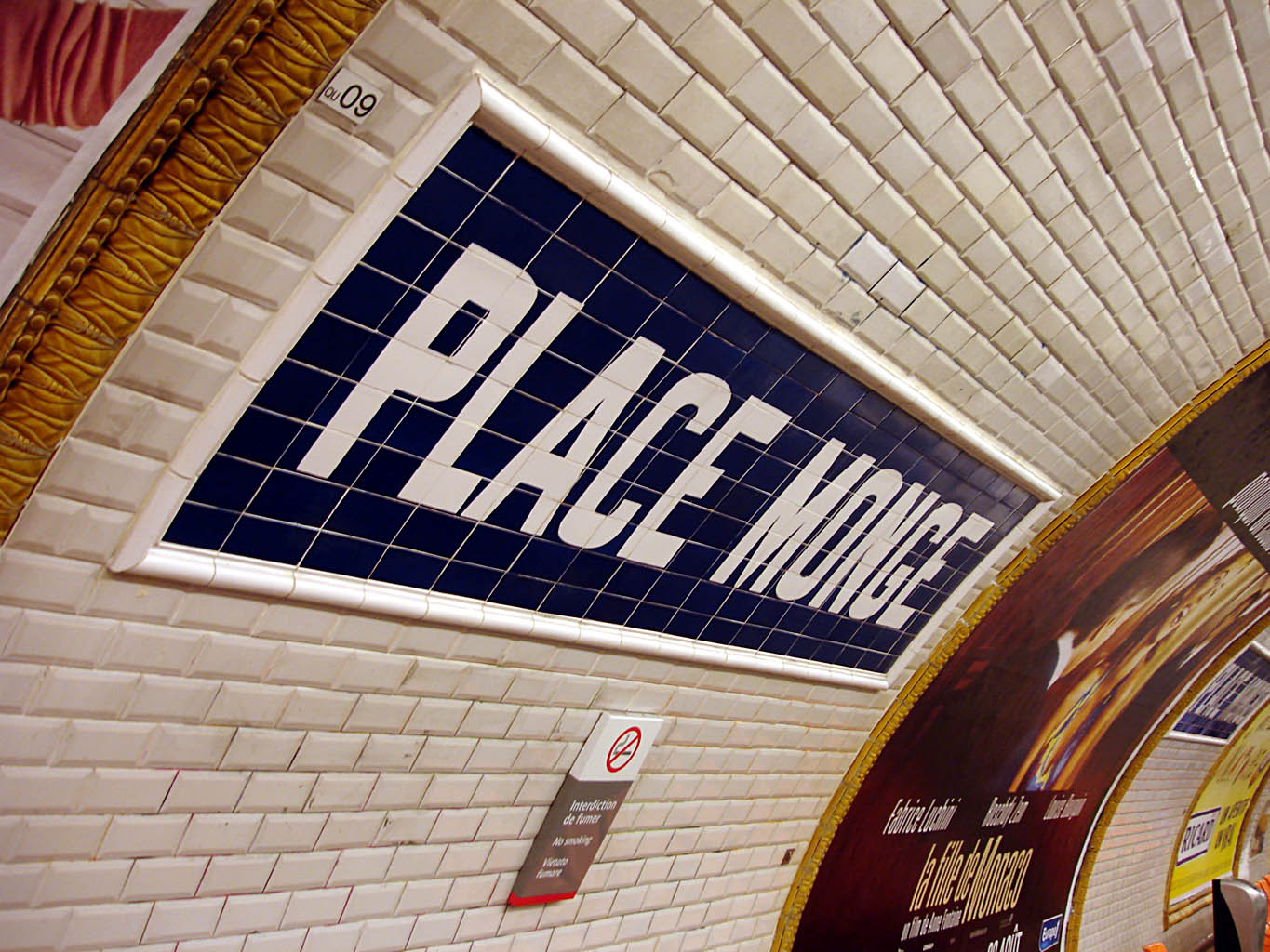 Station Place Monge, de la ligne 7 du métro de Paris, France.